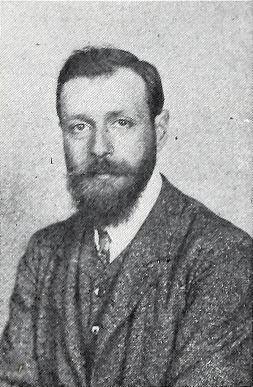 Lorenzo Coullaut-Valera.